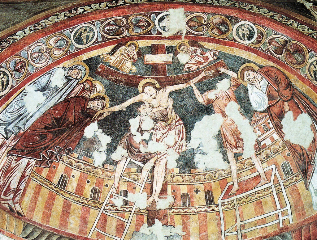 Udine - Santa Maria di Castello - Affresco con Deposizione (XIII secolo)